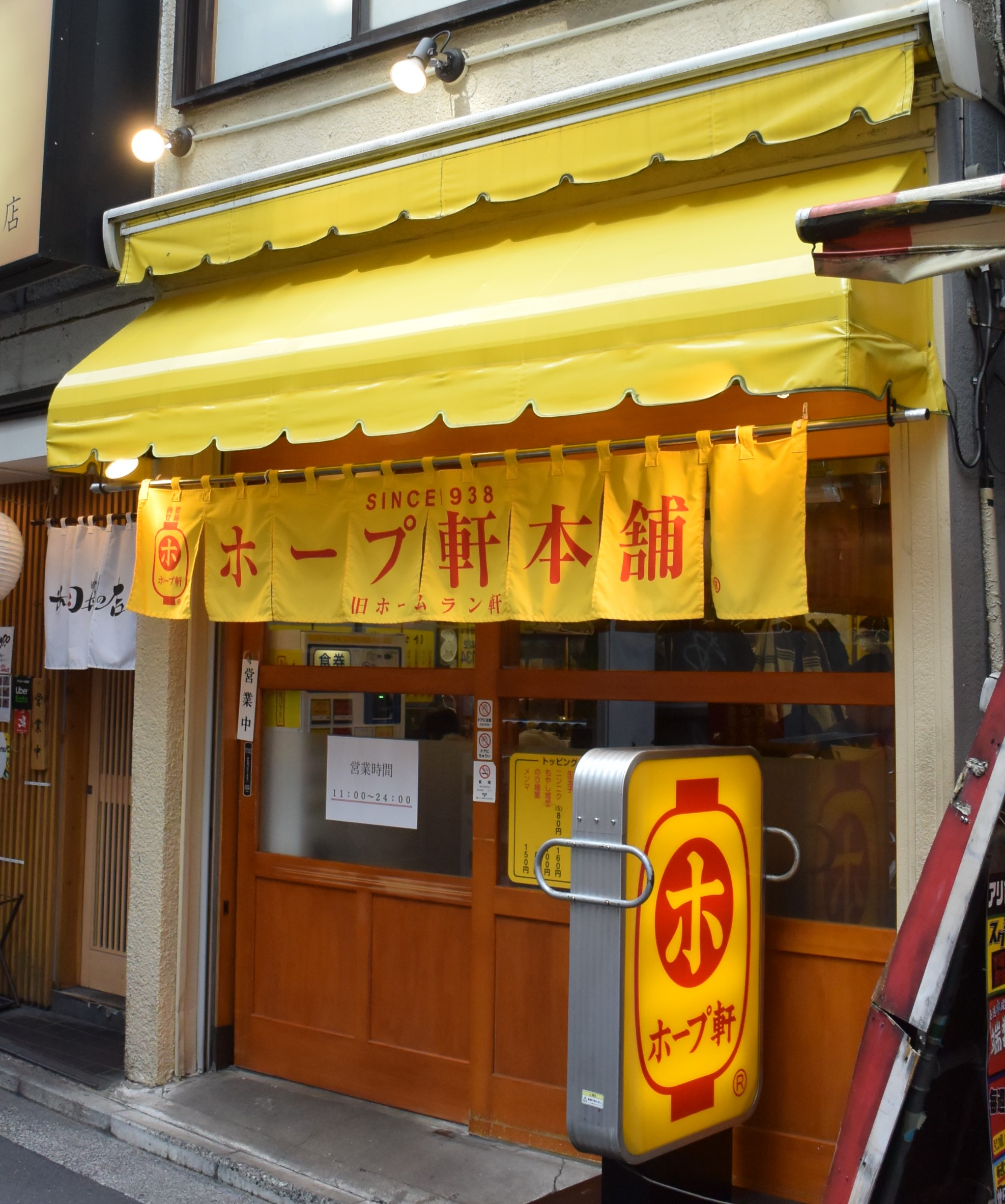 ホープ軒本舗・外観